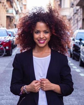 Madrid marzo 2019